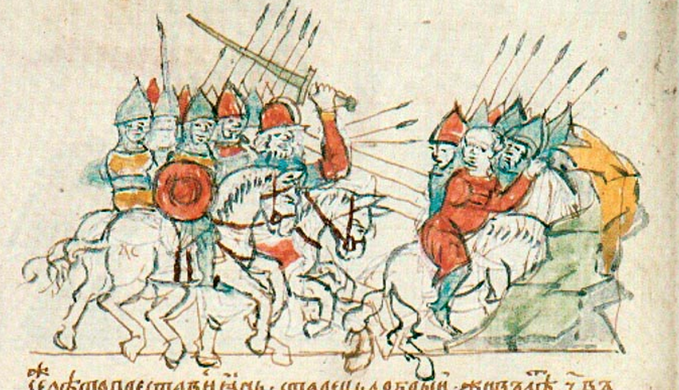 Победа воевод князя Святополка Изяславича Яна Вышатича и Ивана Захарьича Казарина над половцами у Зареческа 1106 год. (Миниатюра Радзивилловской летописи).